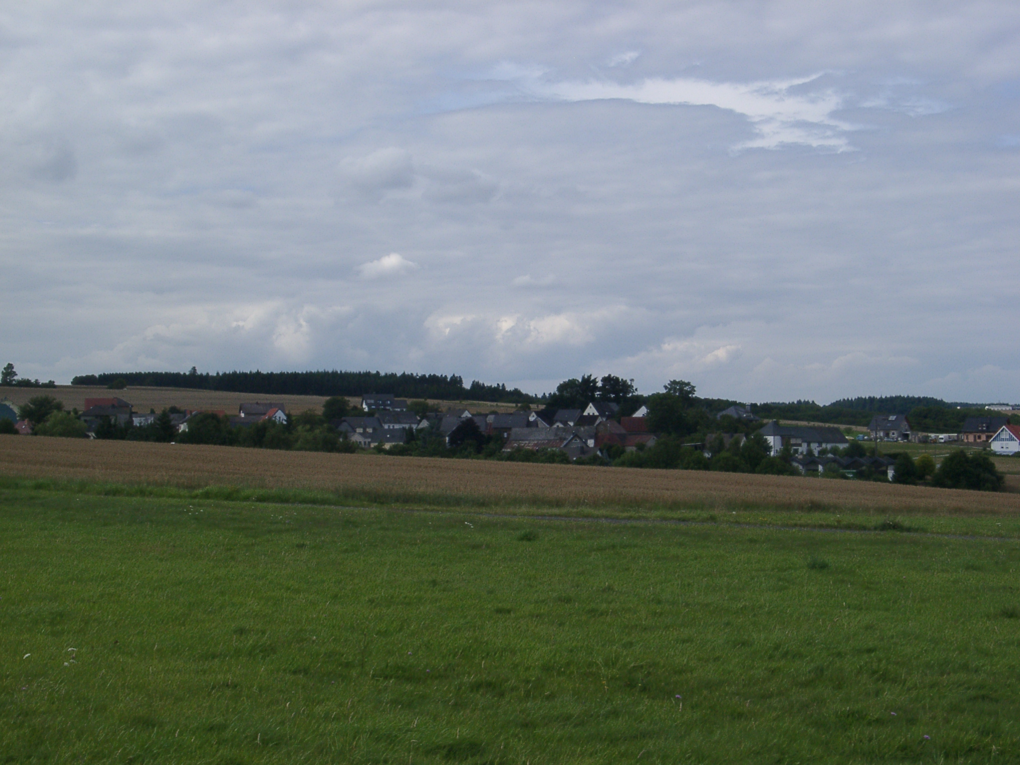 Ansicht von Ditscheid (Eifel)